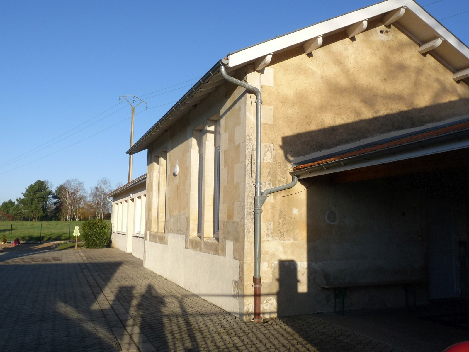 Ecole de Chardes, Charente-Maritime, France